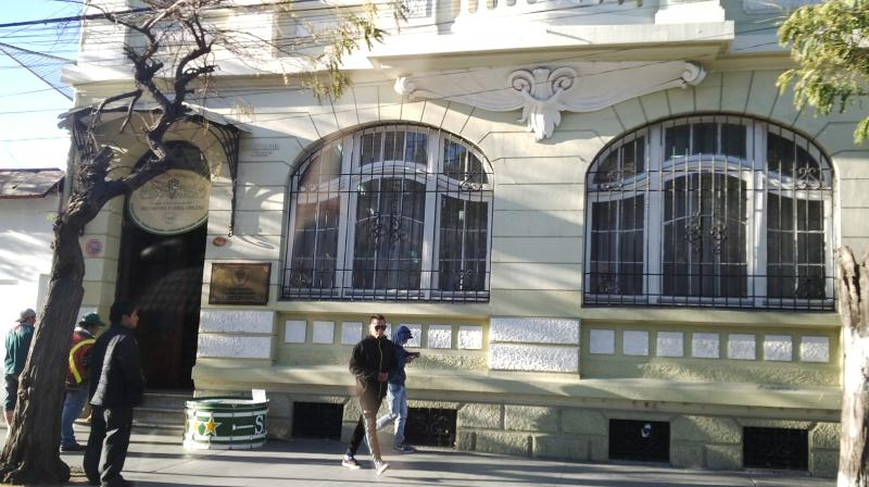 Casa Ballivián This is a photo of a national monument in Chile: 2047